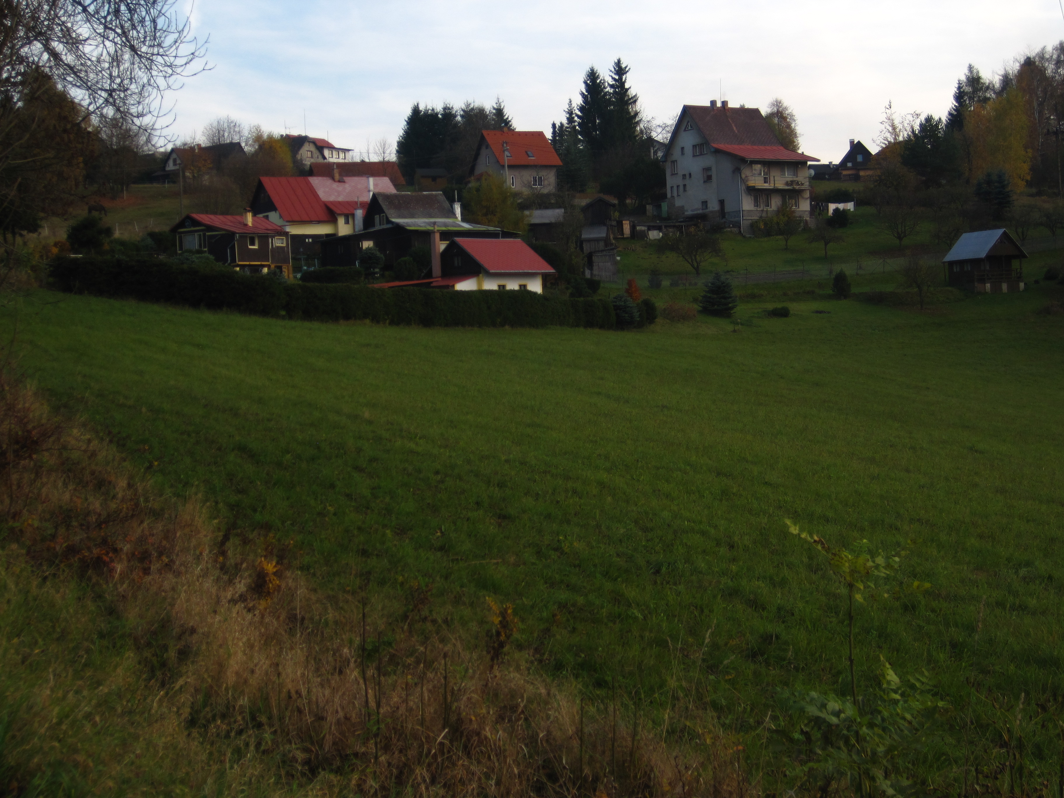 Radčice (na Železnobrodsku) - severozápadní část vsi (při silnici na Loužnici), okolí čp. 51 čp. 95